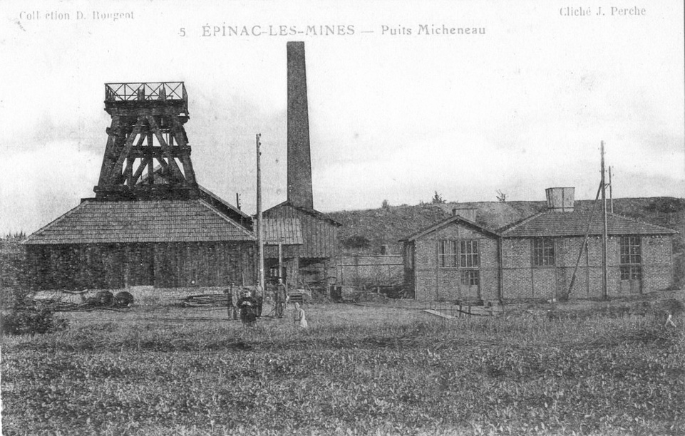 Le puits Michenaux des Houillères d’Épinac.